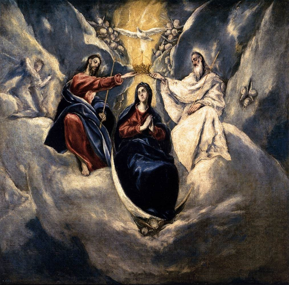 La obra muestra a los tres miembros de la Santísima Trinidad coronando a la Virgen María, madre de Jesucristo.